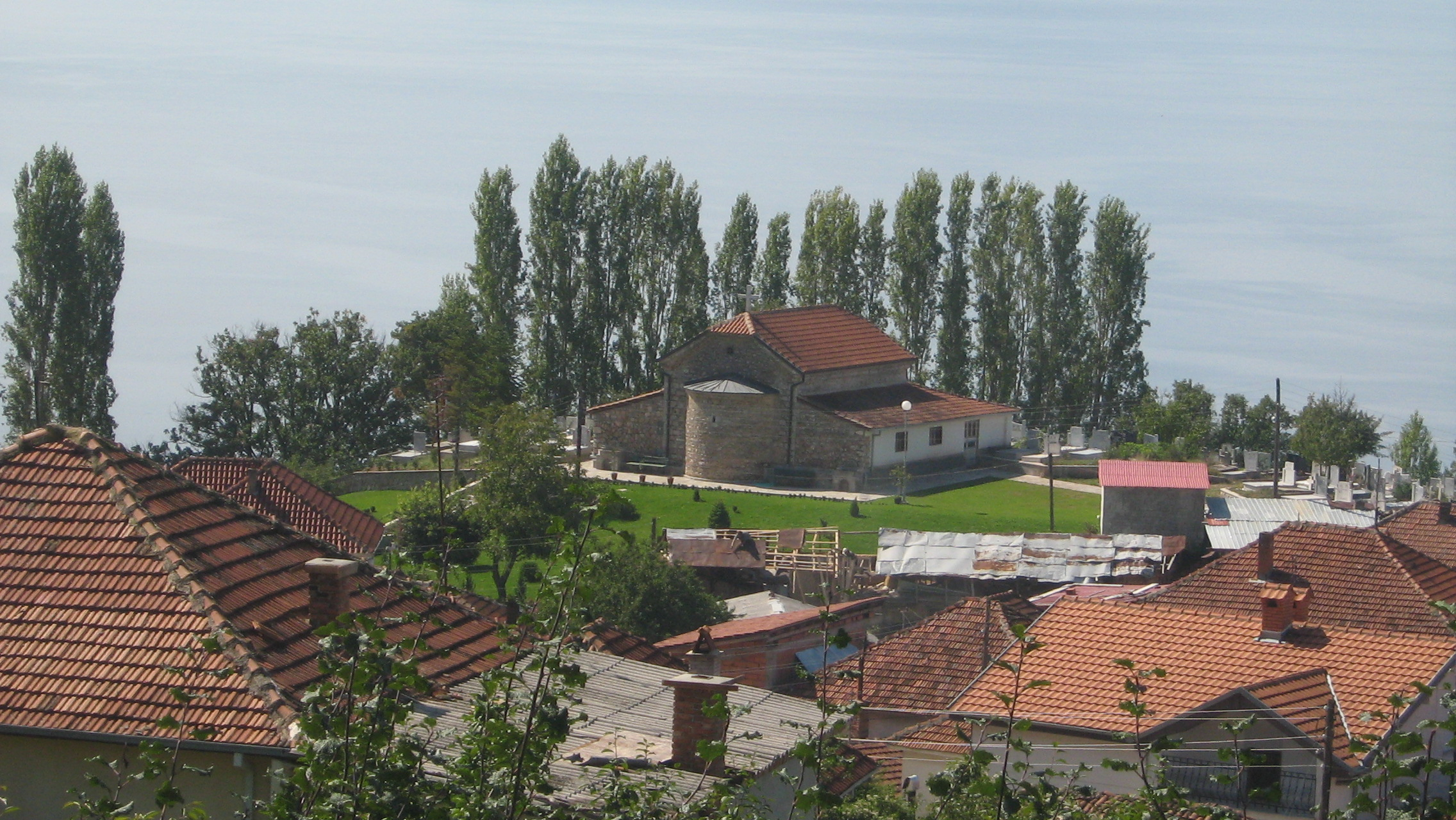 Поглед на Елшани и црквата Св. Илија од Манчој Лиценцирање